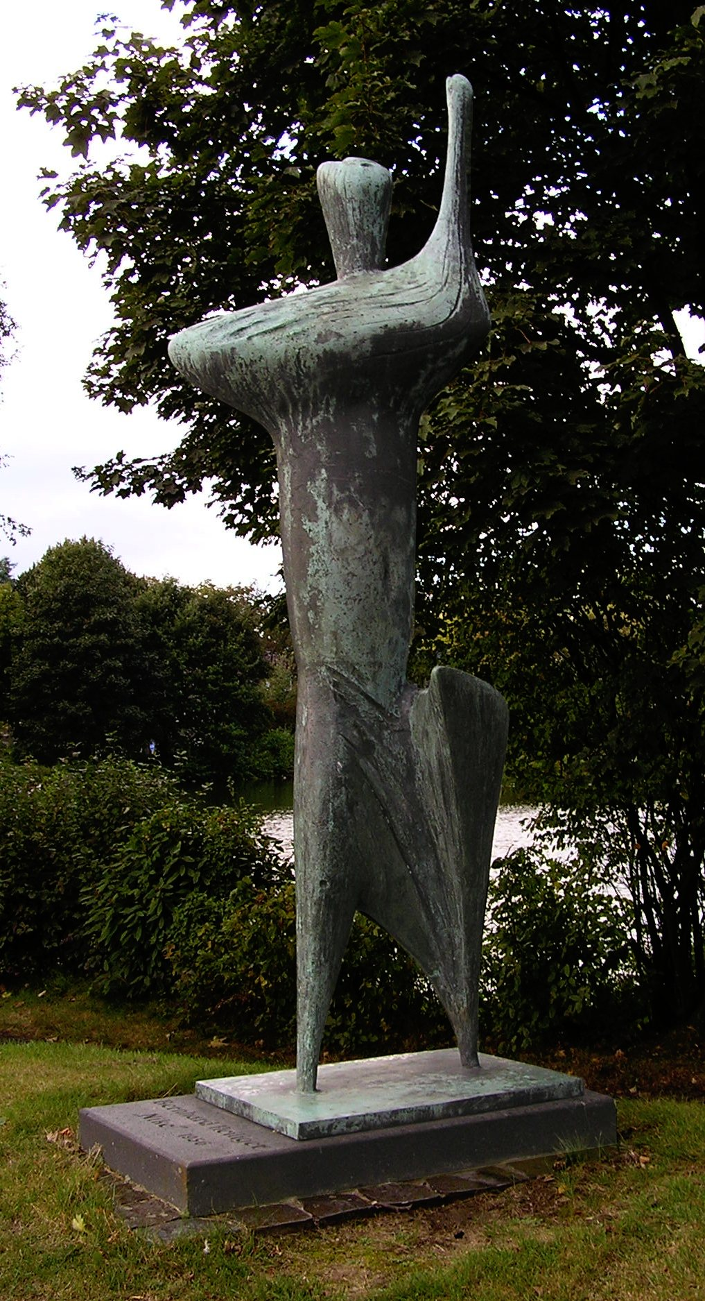 Sculpture "Nike" (1956) by Bernhard Heiliger, Marl